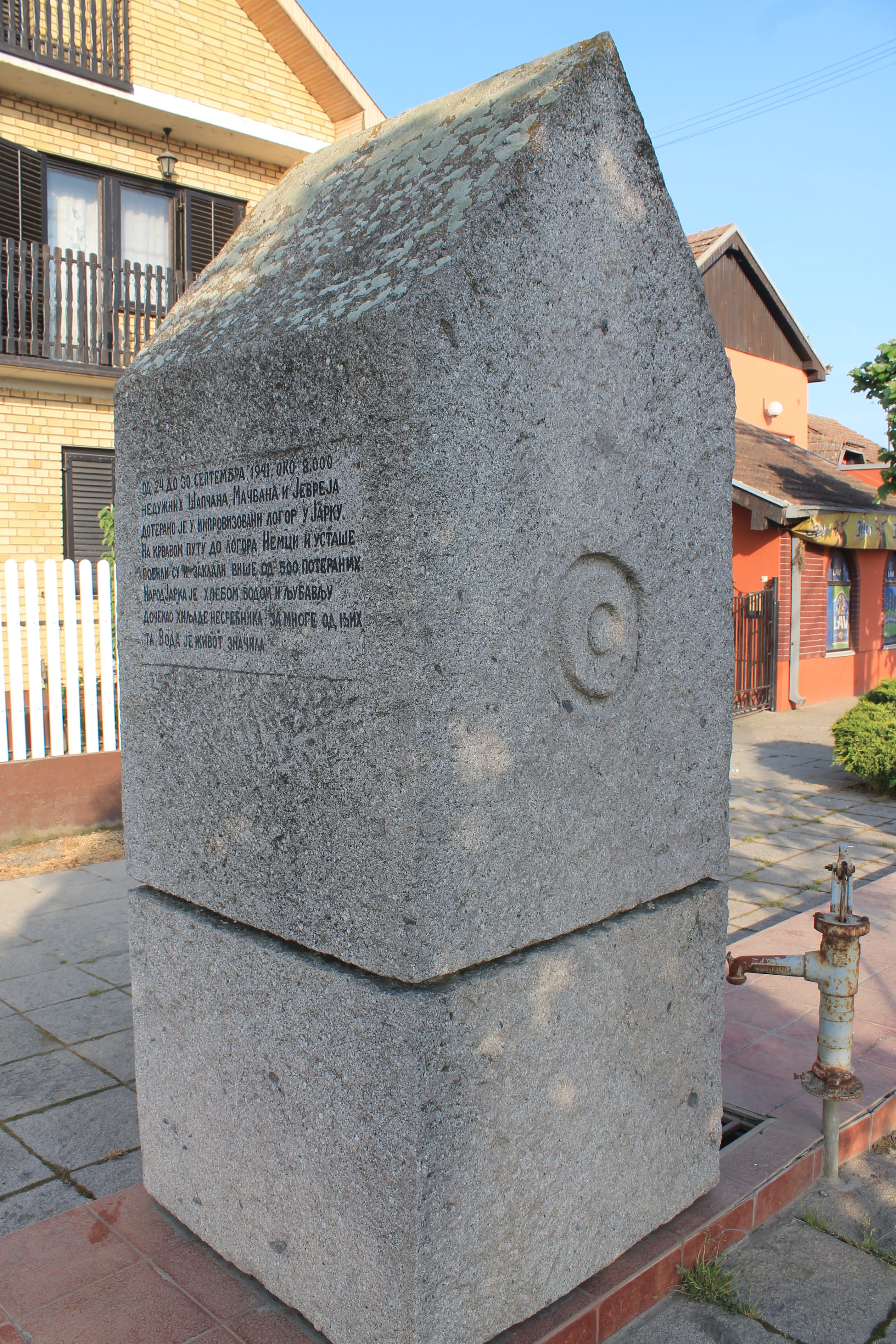 Spomen-česma u Jarku